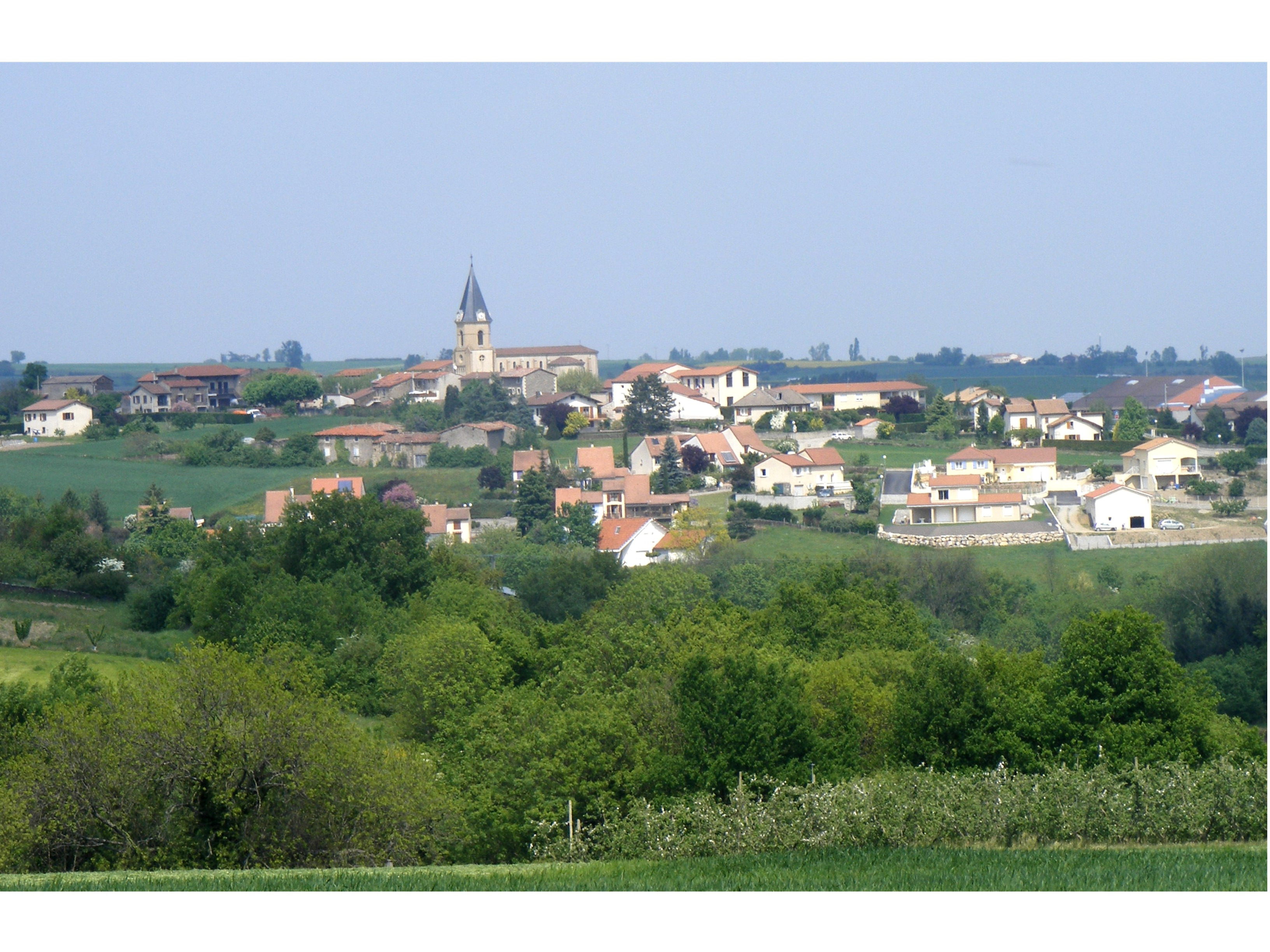 Vue générale du bourg Saint-Joseph (Loire)